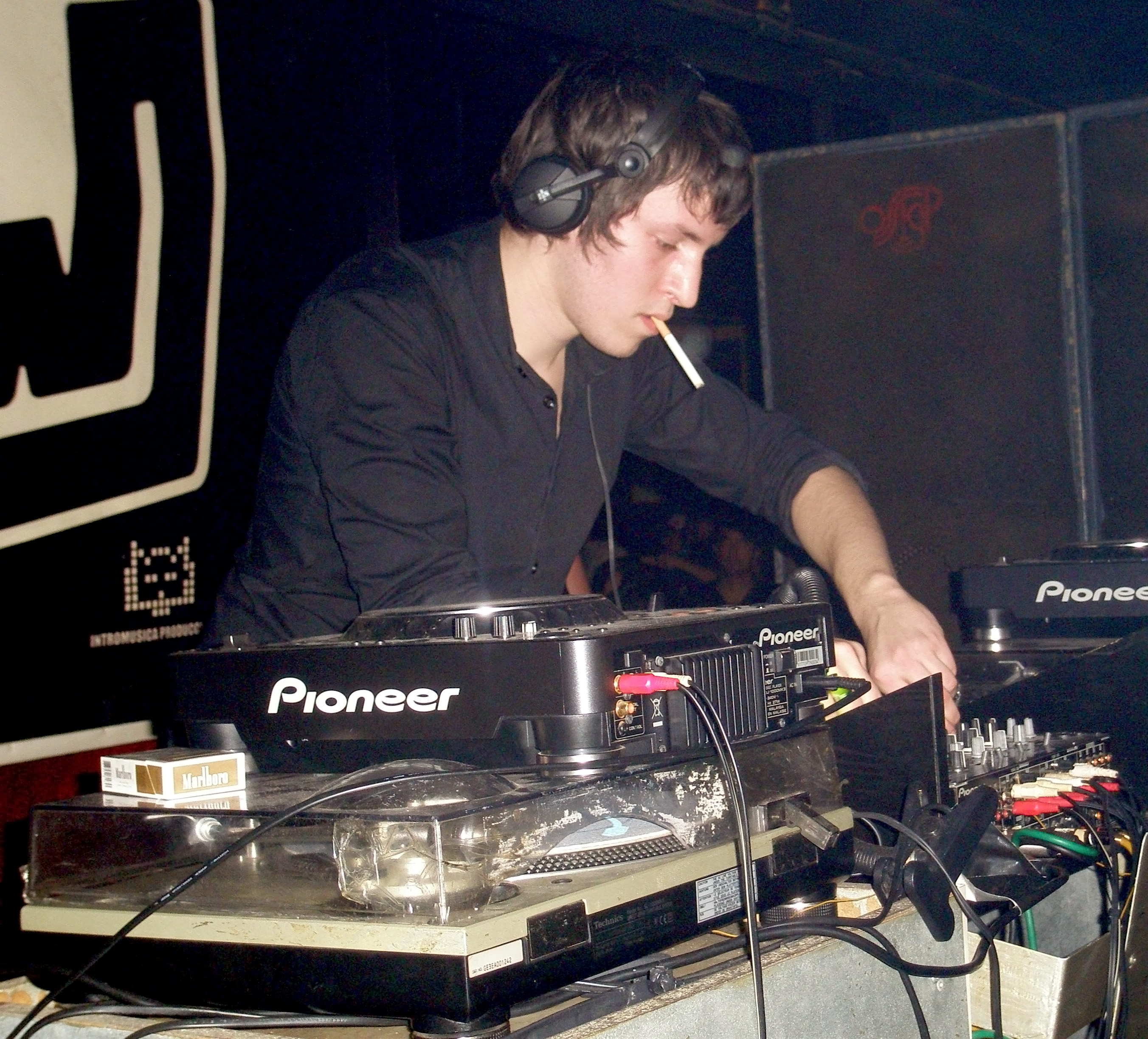 SebastiAn pendant un DJ Set la nuit du 24 au 25 novembre 2007, au Club Low, Madrid, Espagne.